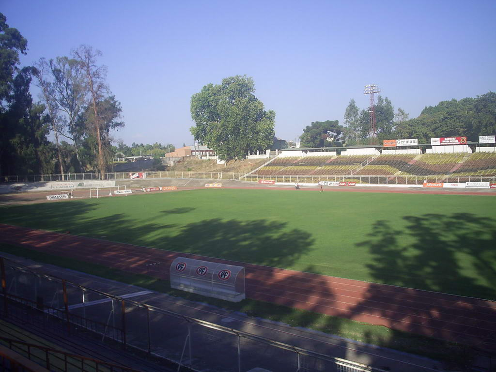 Estadio Fiscal de Talca. Toma de la cancha desde Tribuna mirando hacia Galería.